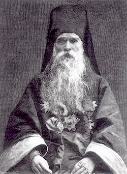 Епископ Гурий (Карпов)